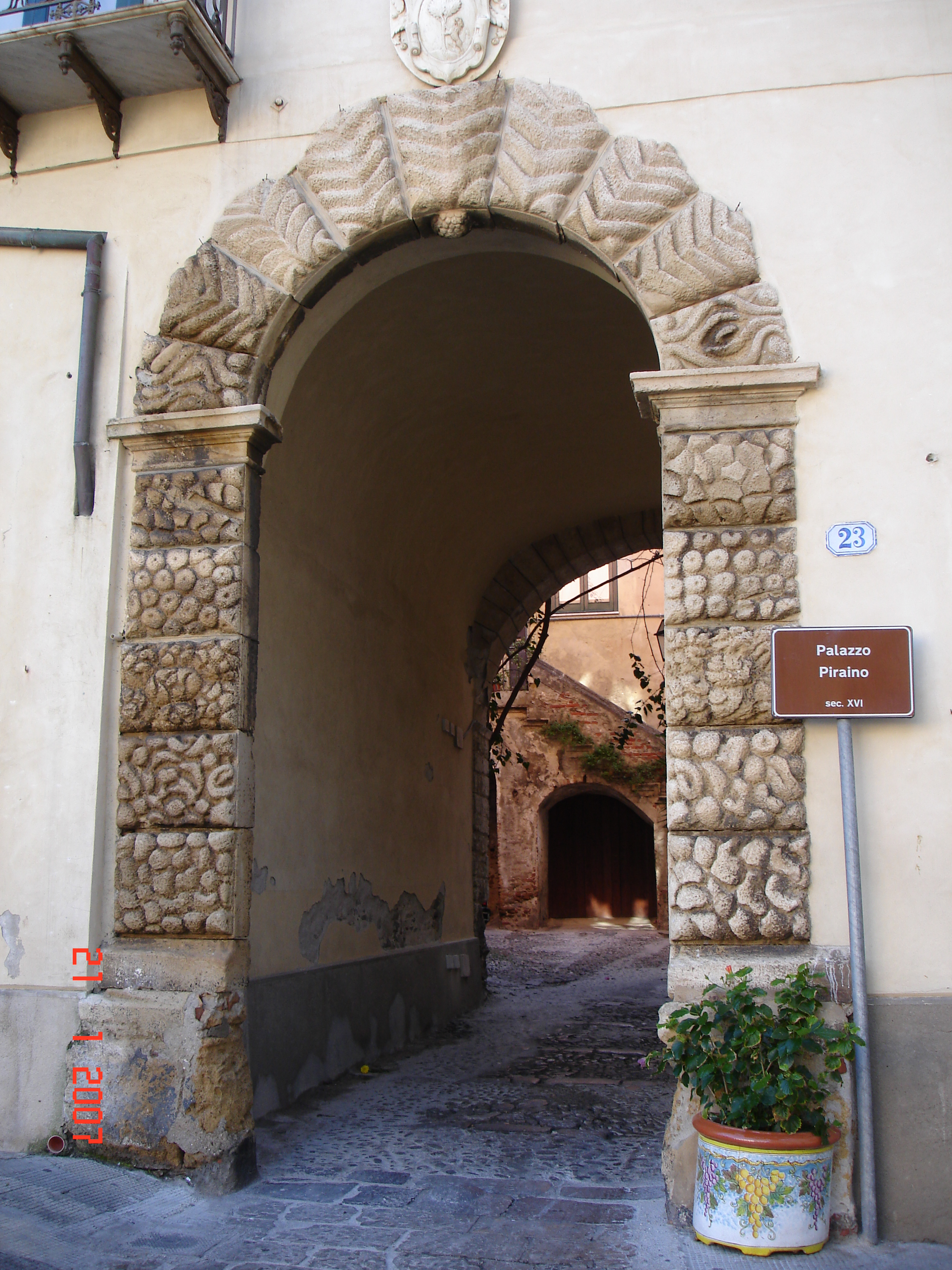 Ingresso di Palazzo Piraino a Cefalù Cortesemente offerta da Pascal Guercio